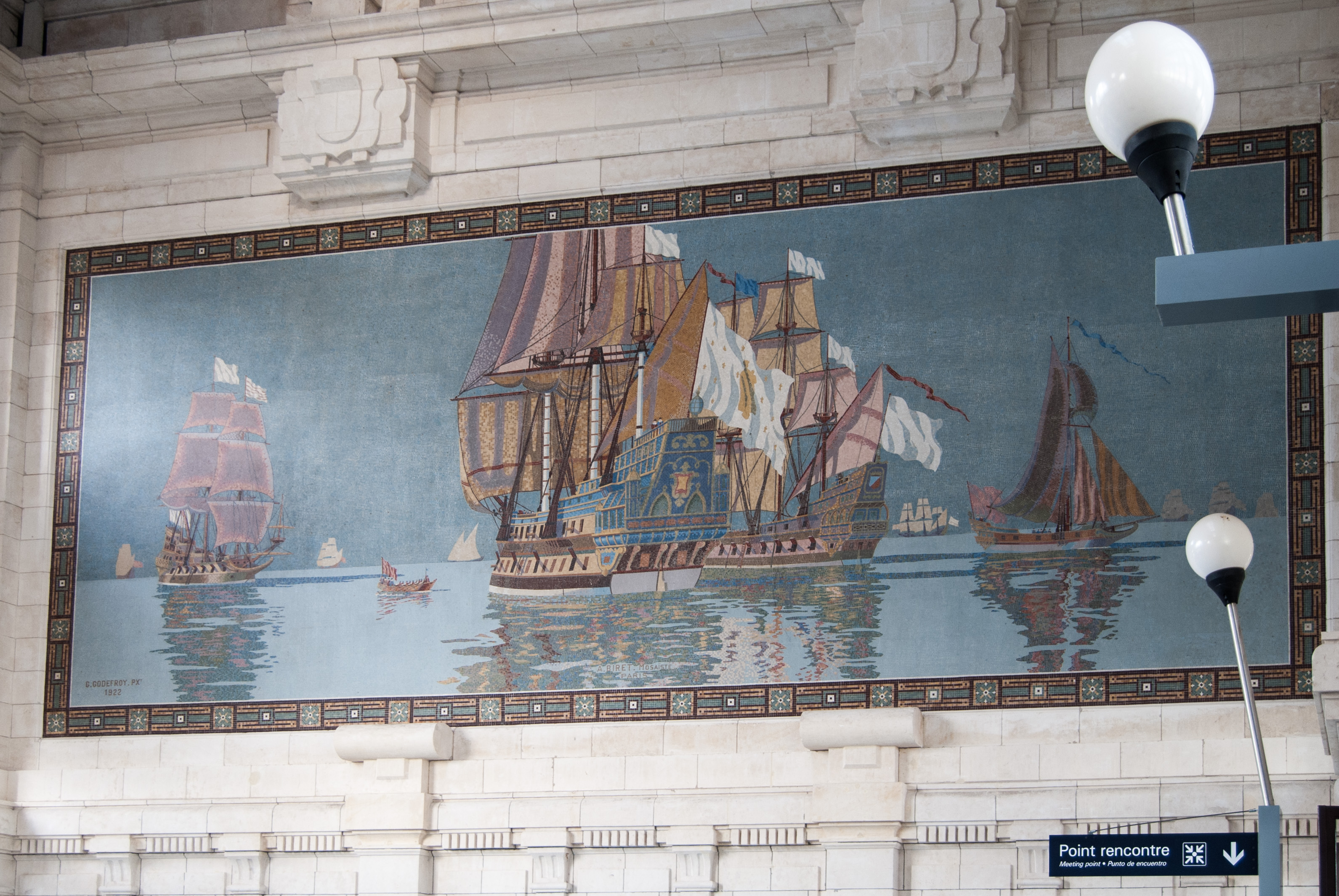 Mosaïque du peintre G. Godefroy (1889-1973 ?), réalisée par le mosaïste A. Biret (Paris) en 1922 et couvrant l'intérieur de l'une des murs de la gare de La Rochelle.